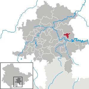 Kamsdorf in Thuringia - District Saalfeld-Rudolstadt